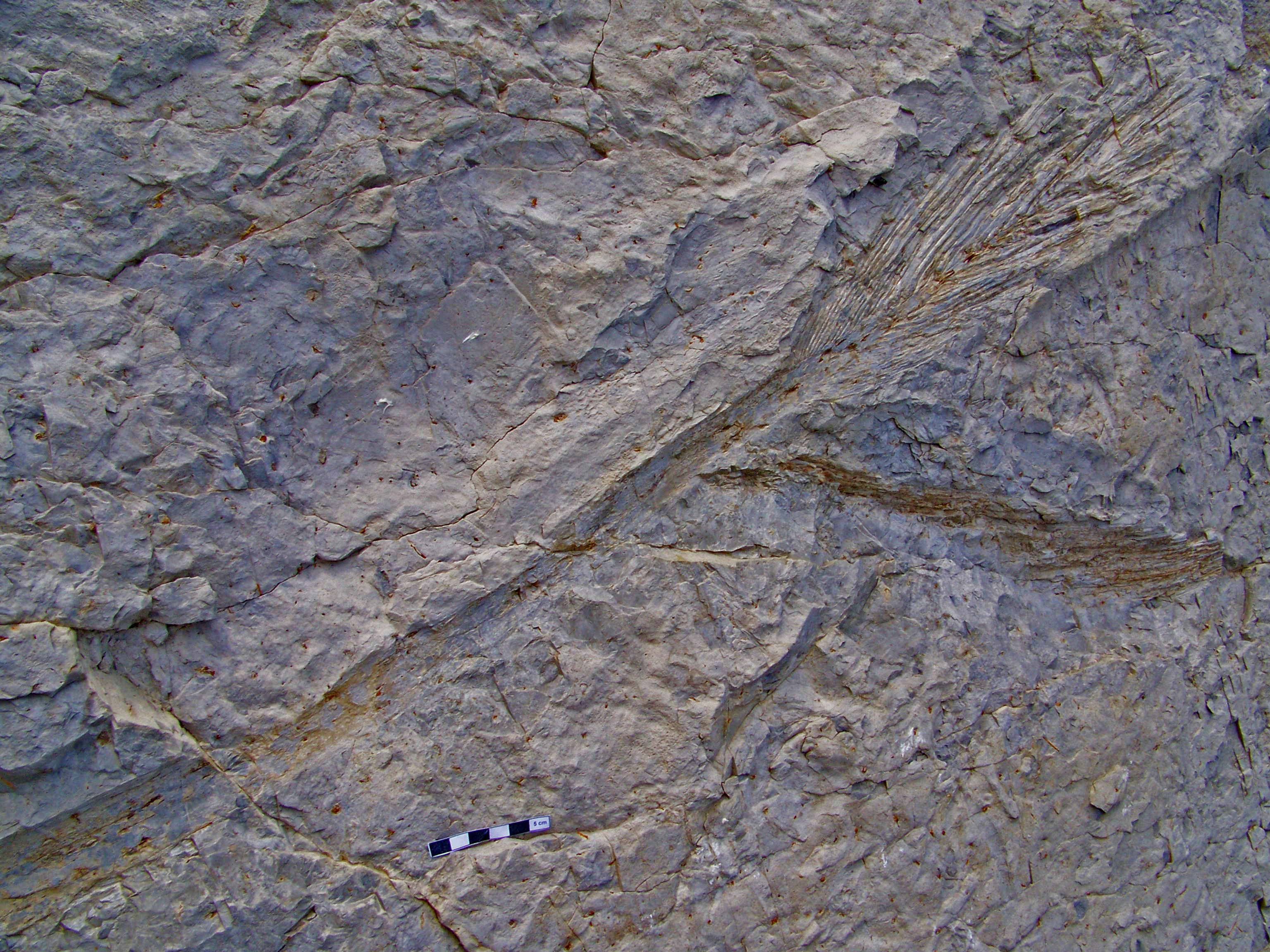 Impressió de fulla de Sabalites longirhachis completa al jaciment de Mina Esquirol (Vallcebre, Berguedà, Barcelona).